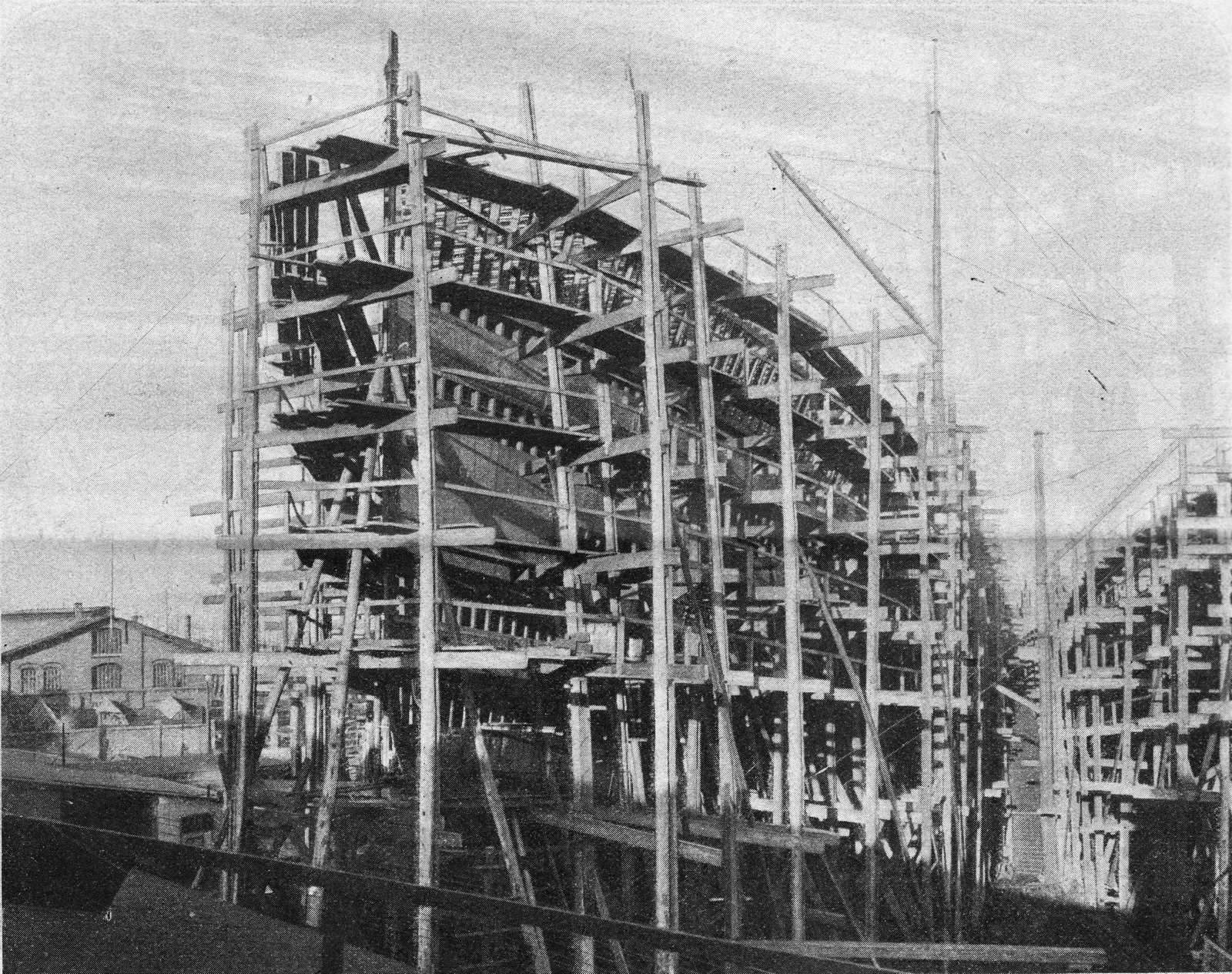 Der Schnelldampfer "Deutschland" im Bau am 24. September 1899